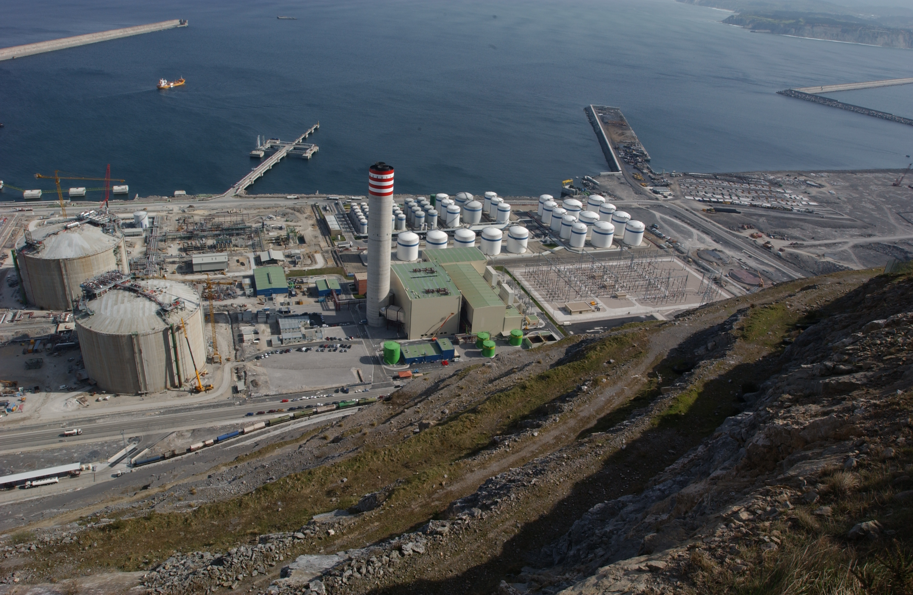 Bizkaiko Badia Elektrizitatea